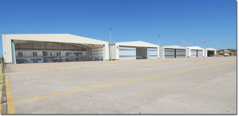 Hangares Aeródromo Municipal Cascais